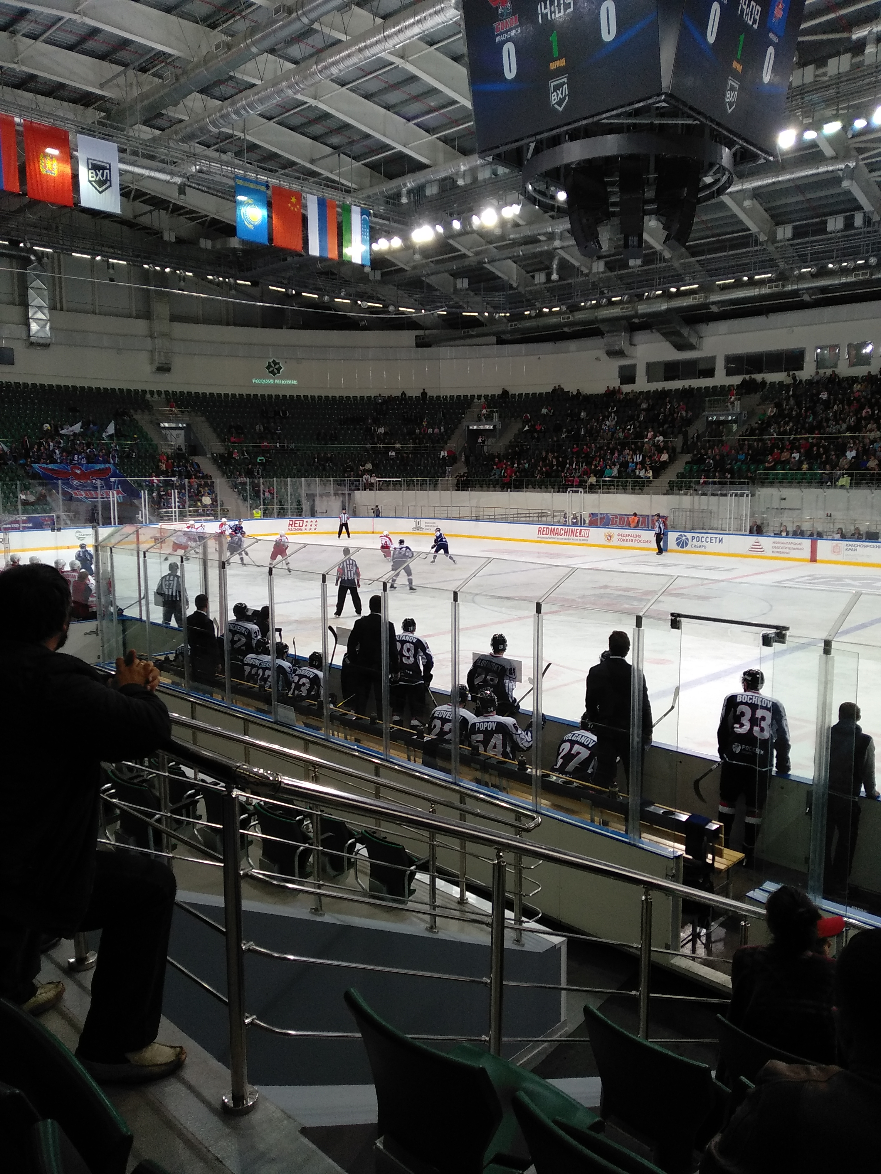 Скамейка Сокола в матче "Сокол"-"Ижсталь", 22.09.2019